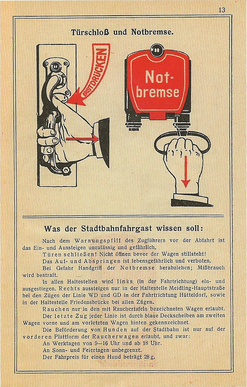 Informo el broŝuro pri la urbfervojo de Vieno